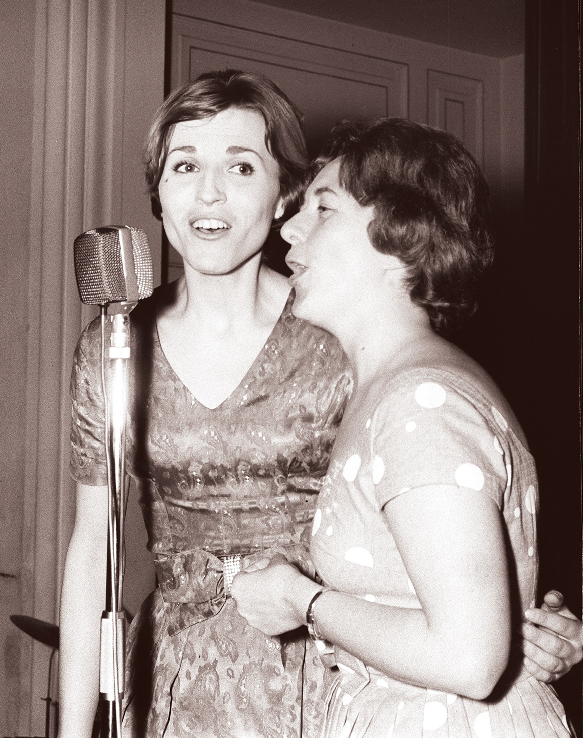 Marjana Deržaj and Beti Jurkovič